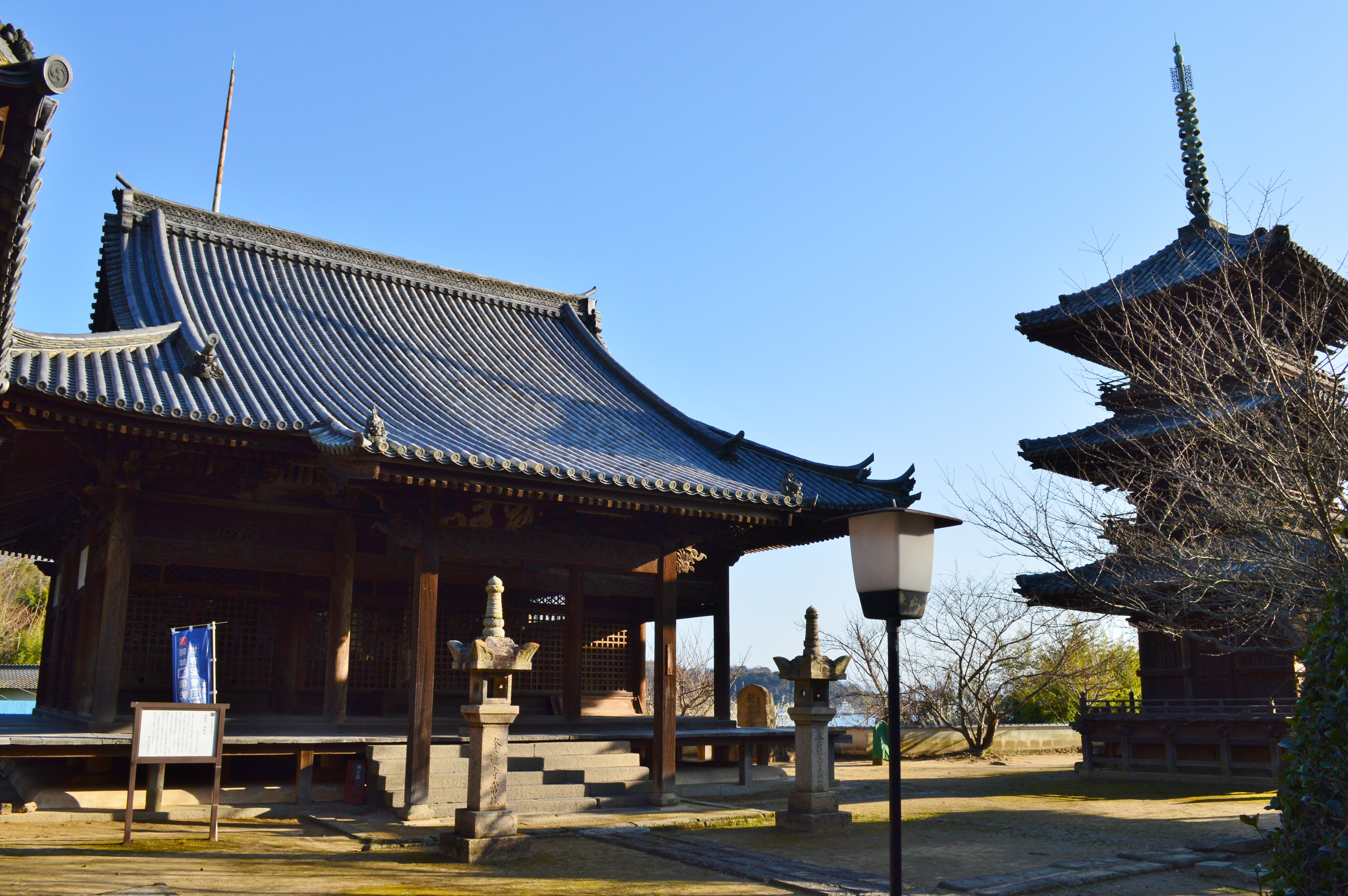 本蓮寺 (瀬戸内市) 境内